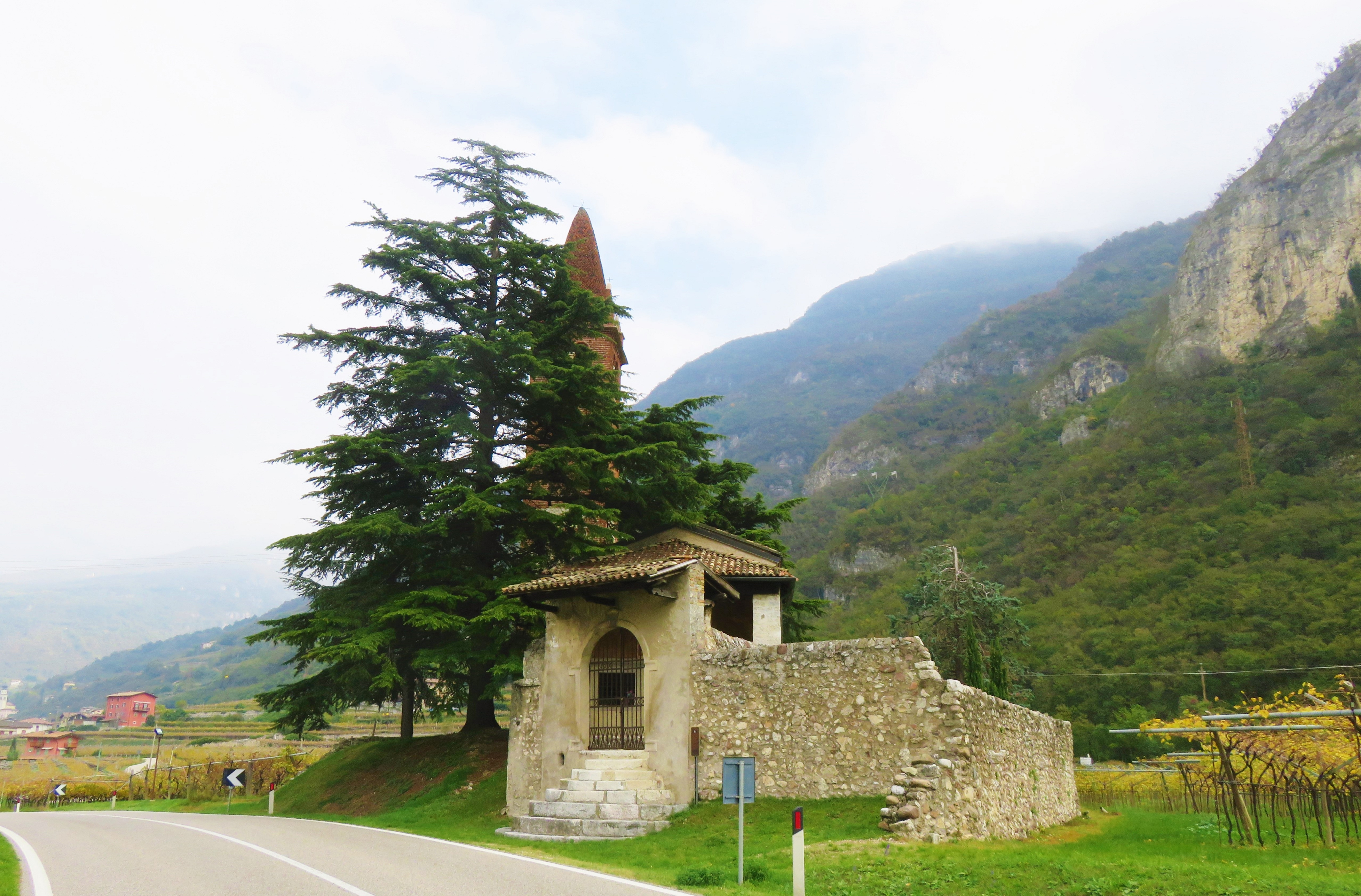 Chiesa vista dalla Strada Statale 12, sulla strada da Verona ad Ala.